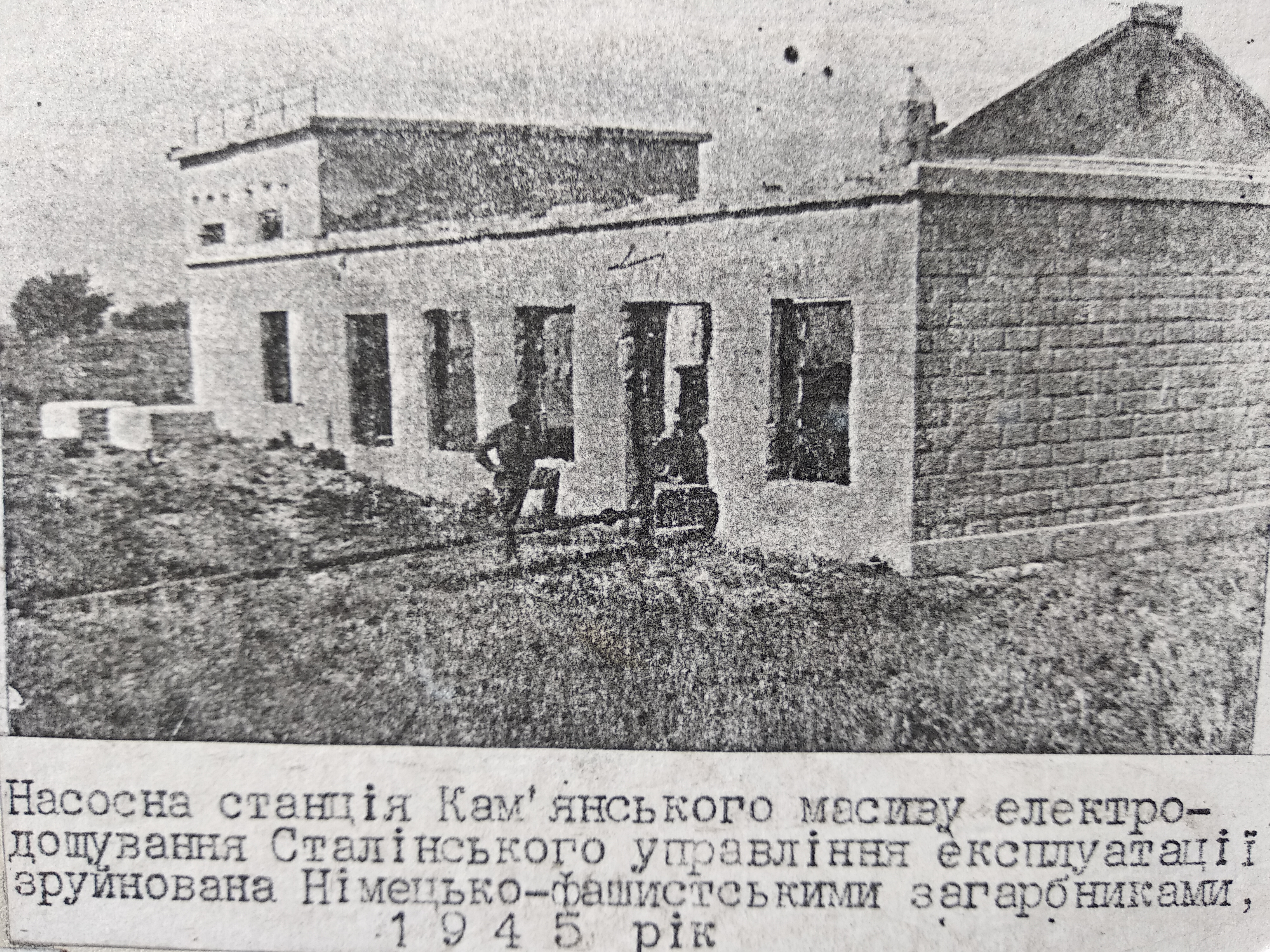 Насосна станція Кам'янського масиву